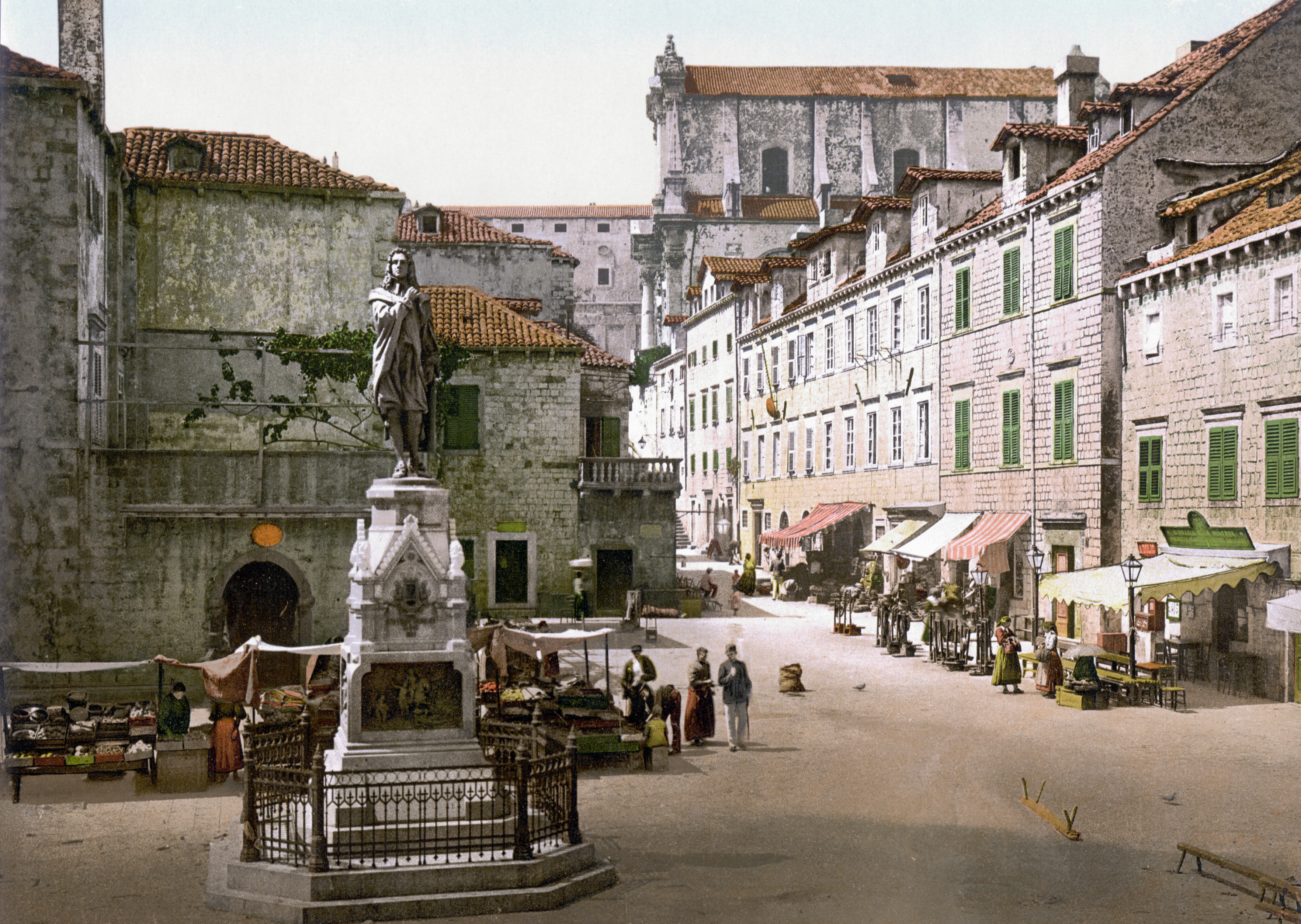 Denkmal für Ivan Gundulić in Ragusa (historischer deutscher und italienischer Name der kroatischen Stadt Dubrovnik)